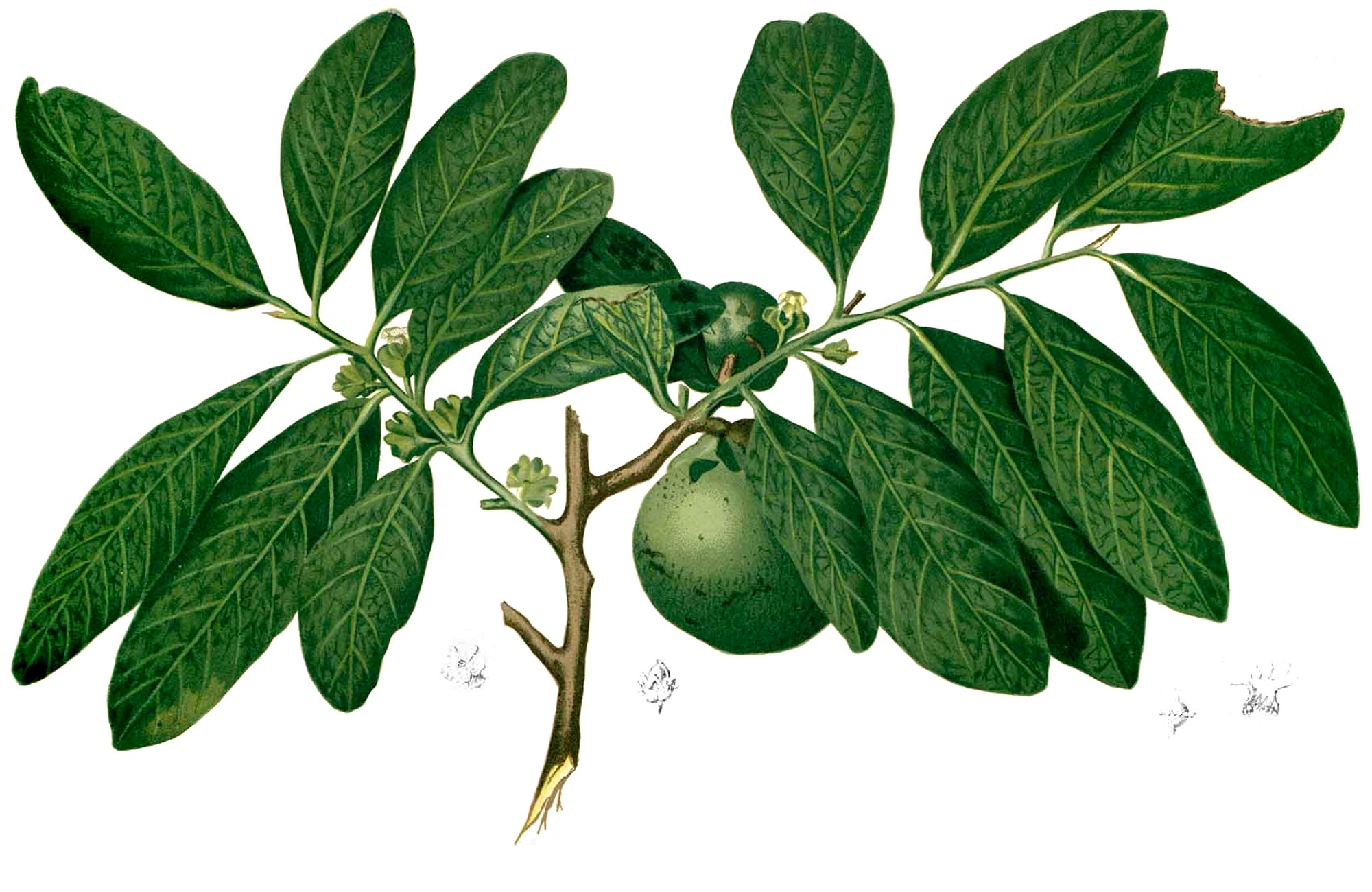 Diospyros digyna (syn. D. nigra). Plate from book